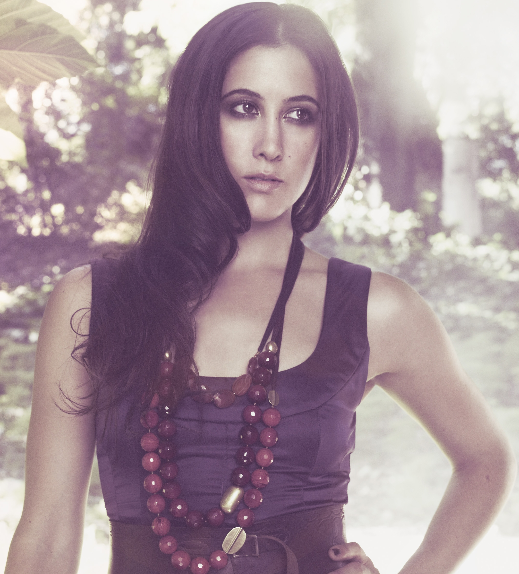 Vanessa Carlton, promotional photo